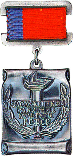 Нагрудный знак "Заслуженный работник культуры РСФСР"